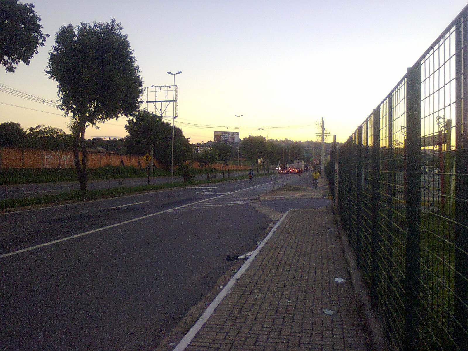 Avenida Perimetral Norte, na altura do shopping Passeio das Águas, no fim de tarde do dia 30 de abril de 2015.